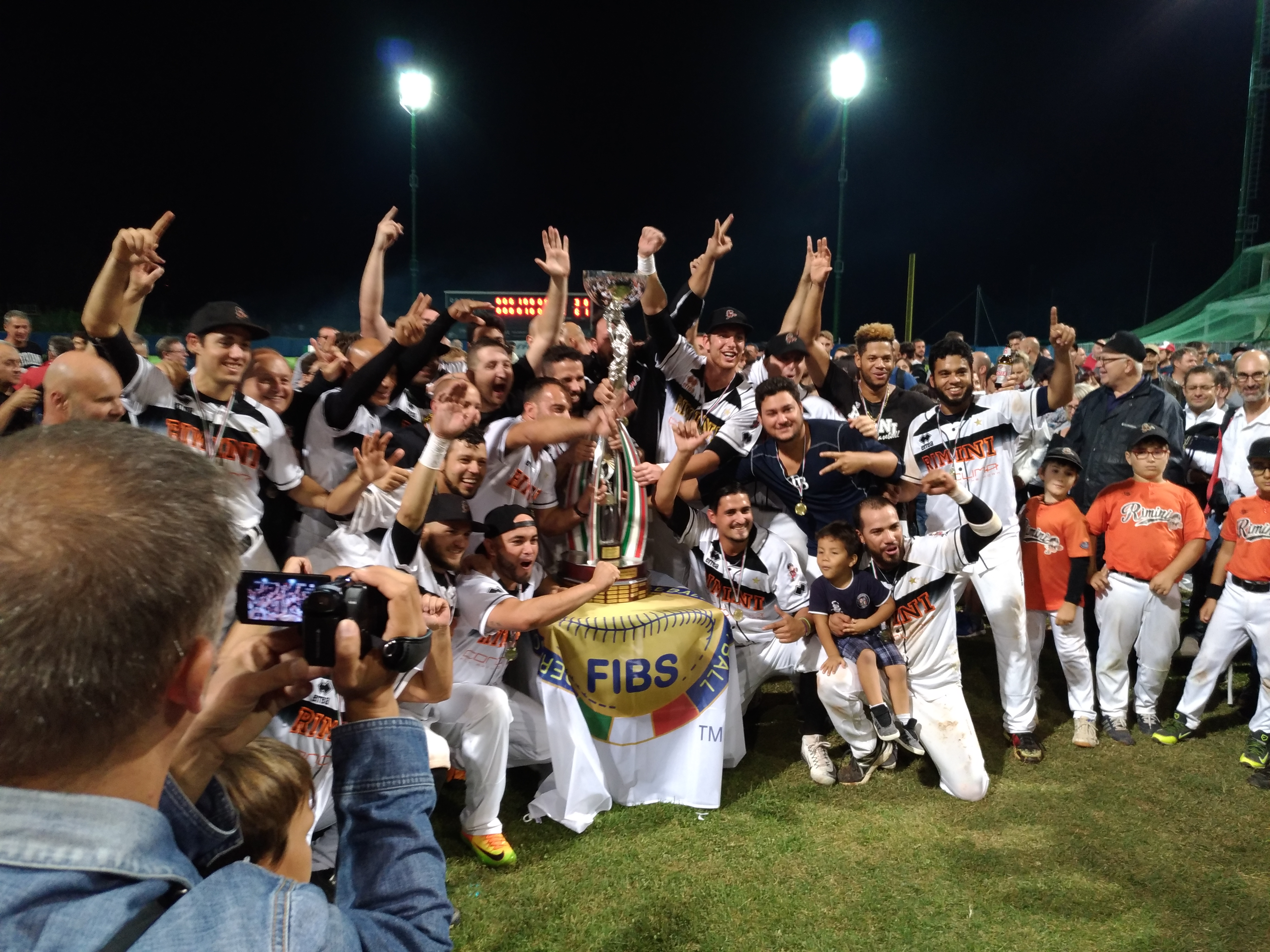 Il Rimini Baseball festeggia la vittoria dell'IBL 2017 e del suo tredicesimo scudetto.